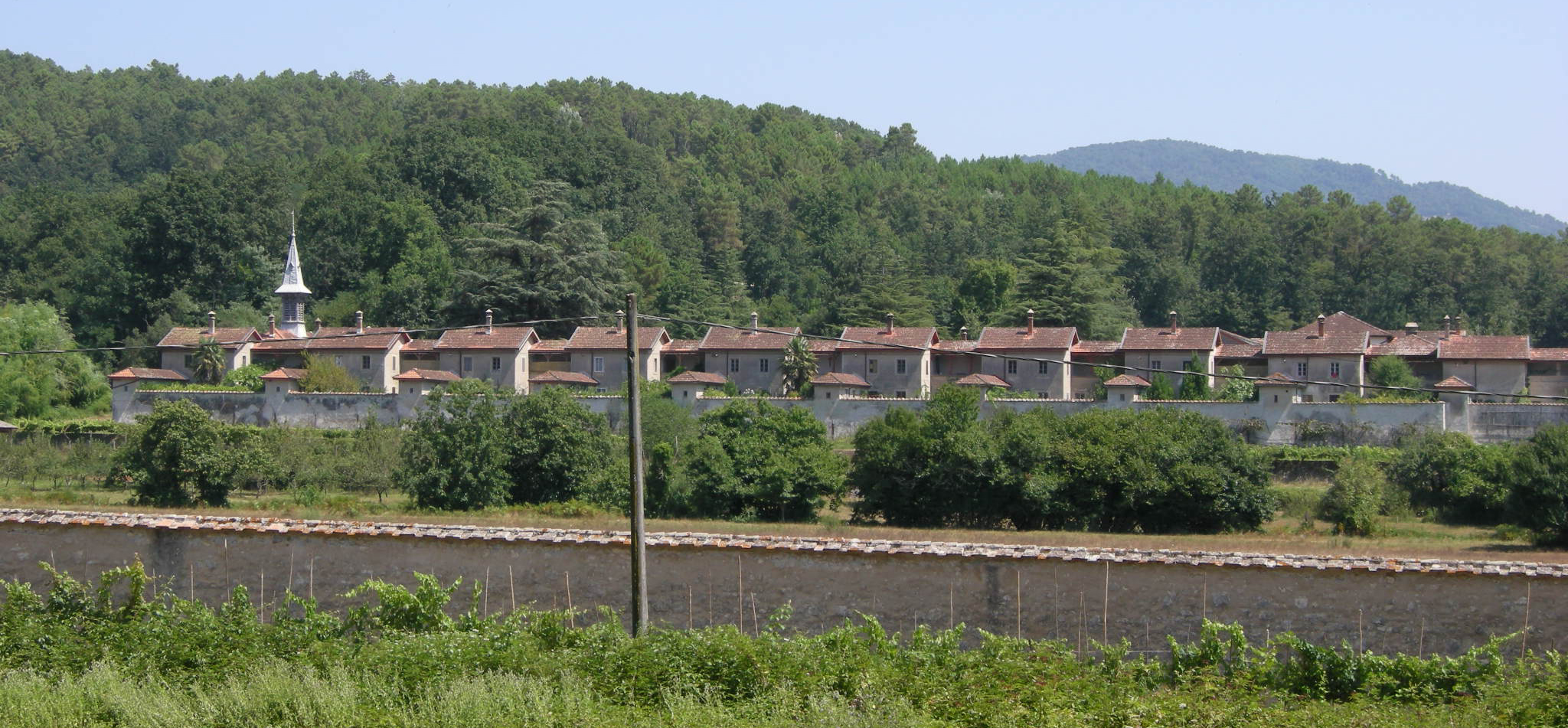 Certosa di Farneta, view 04 celle